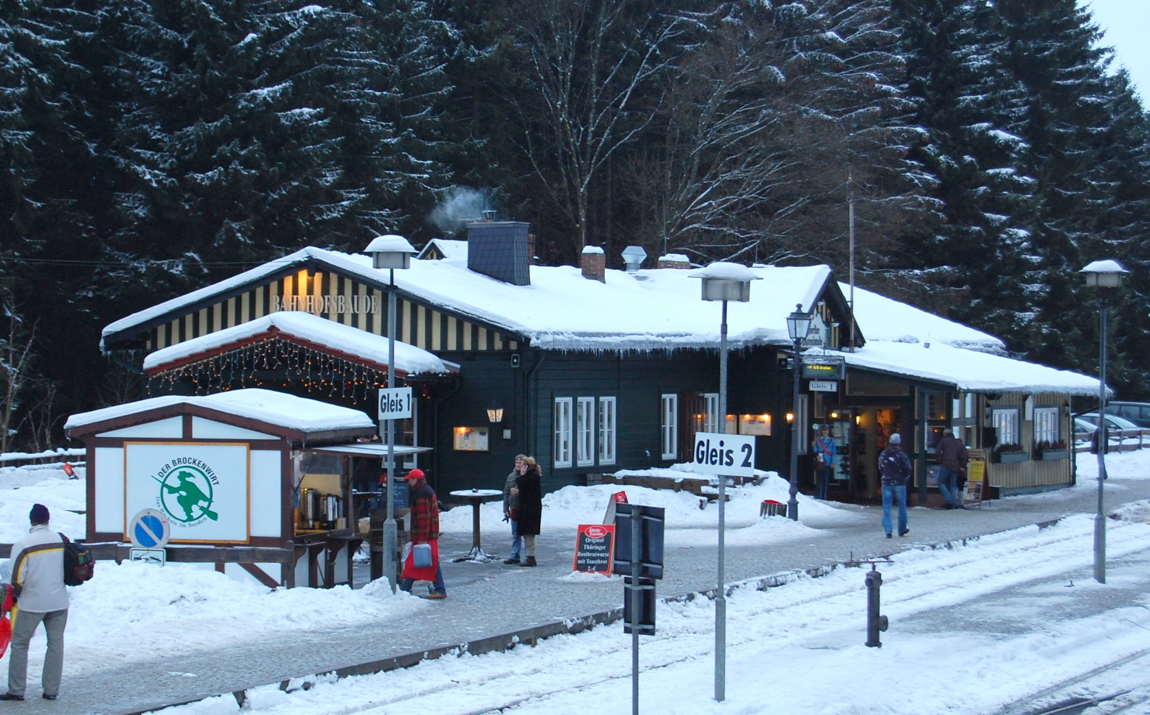 Bahnhof Schierke